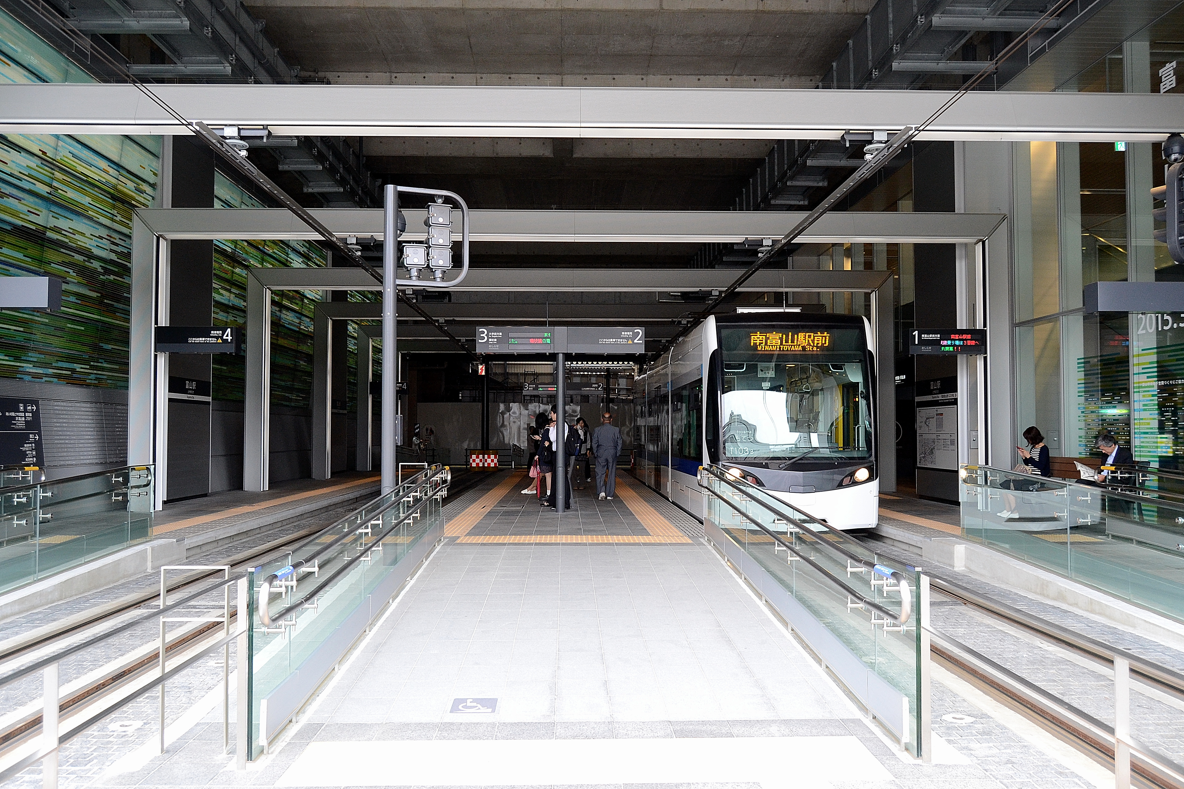 富山地方鉄道富山市内軌道線の富山駅停留場